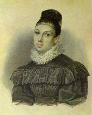 Нарышкина Елизавета Петровна Род. 1 апреля 1801 г. Дочь генерала П.П.Коновницына. Вышла замуж за Михаила Михайловича Нарышкина (1798-1863), полковника Тарутинского пехотного полка, члена Северного общества, осужденного по IV разряду. Приехала за ним в Читинский острог в мае 1827 г. Умерла 11 декабря 1867 г. в селе Гаряй Псковской губернии. Ист.: Павлюченко Э.А. В добровольном изгнании, М., Наука, 1980, С.154. Акварель Н.А.Бестужева. Петровский завод, 1832 г.